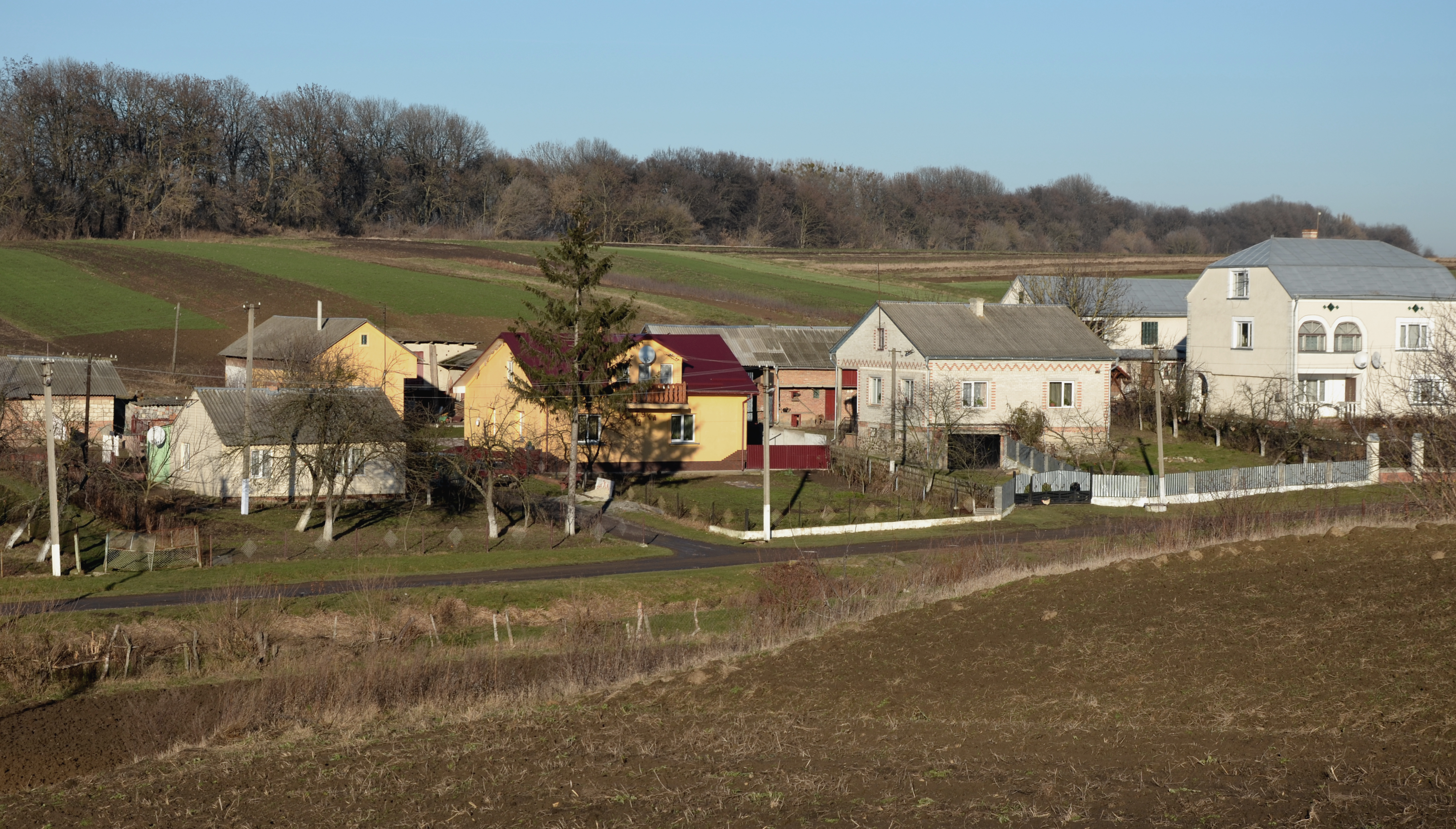 Село Дідилів Кам'янко-Бузького району.